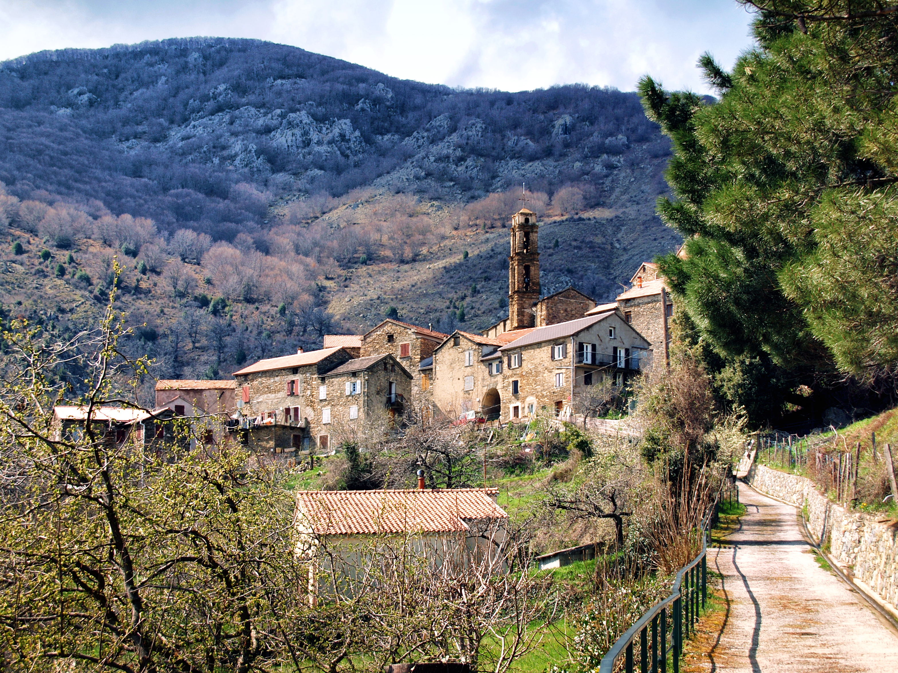 Rusio, Casaluna (Corse) - Vue du village au pied de la punta di l'Ernella (1473 m)